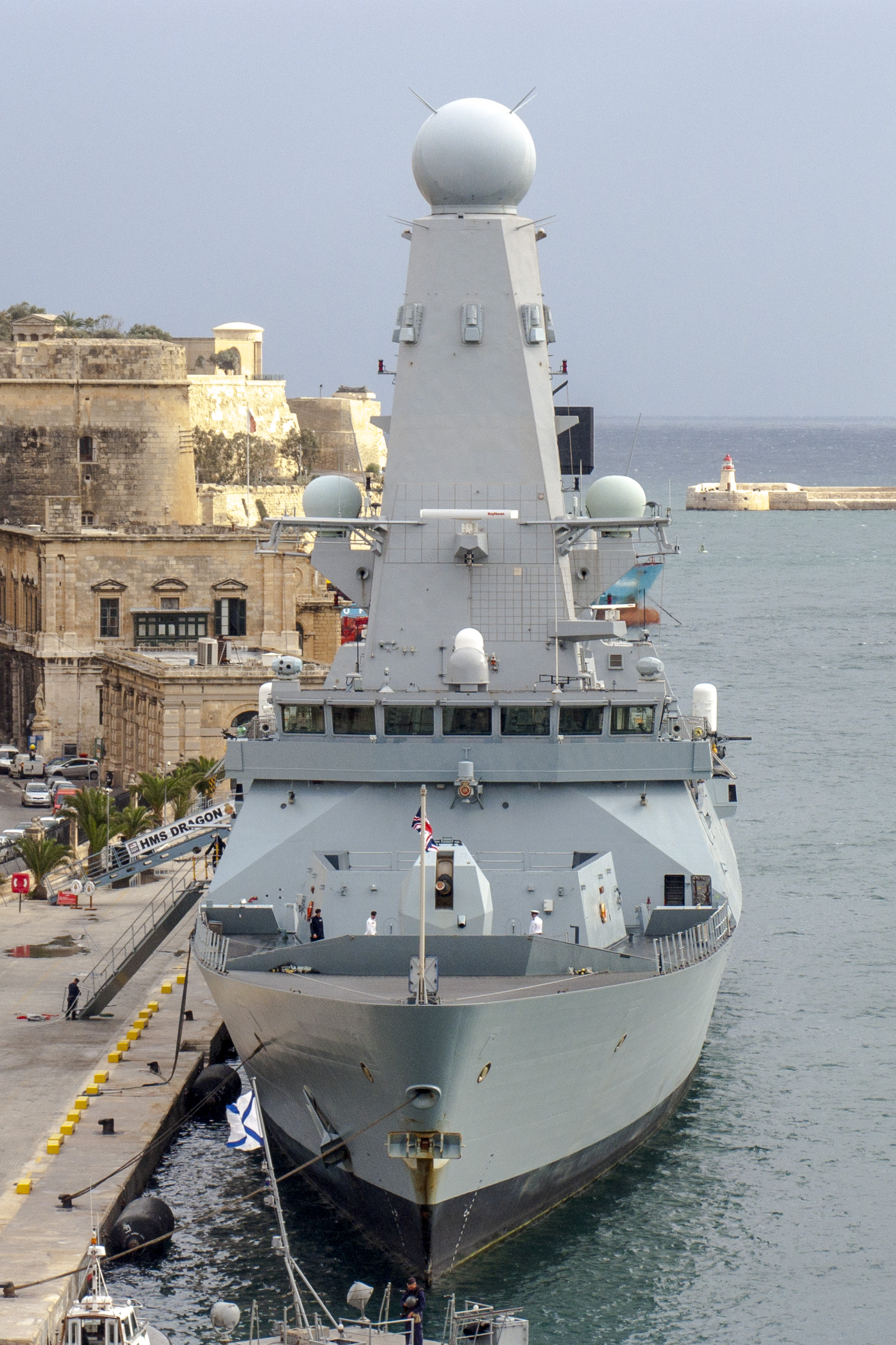 Эсминец "Дракон" в Валлетте. Вид спереди.